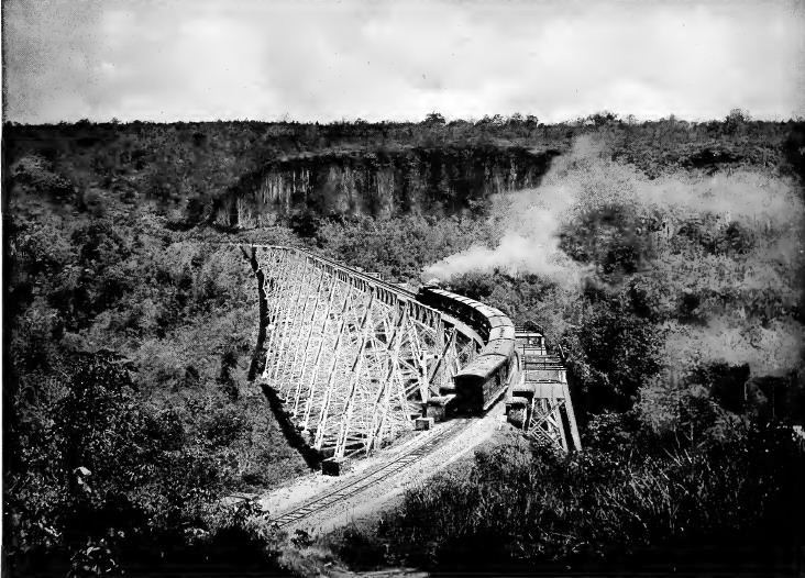 Gokteik viaduct, Shan State